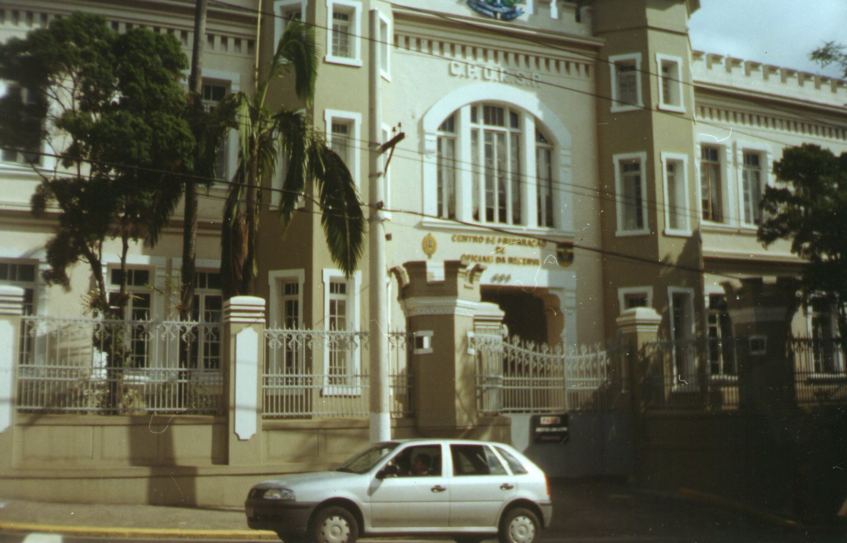 Foto tirada no ano de 2002, da fachada do Centro de Preparação de Oficiais da Reserva de São Paulo, localizago no bairro de Santana, Zona Norte da cidade de São Paulo, Brasil